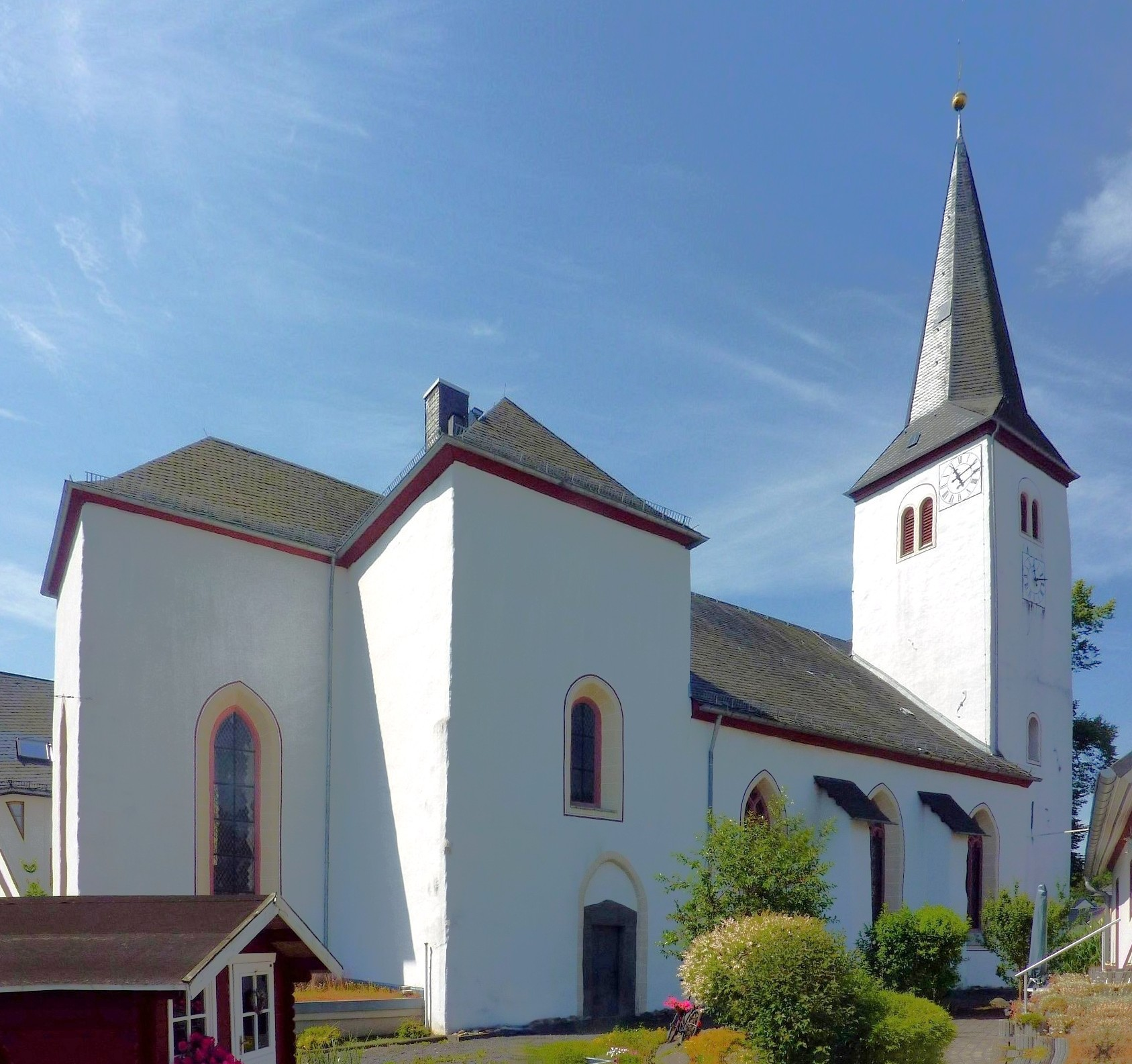 Stiftskirche St. Severus (Gemünden, Westerwald)